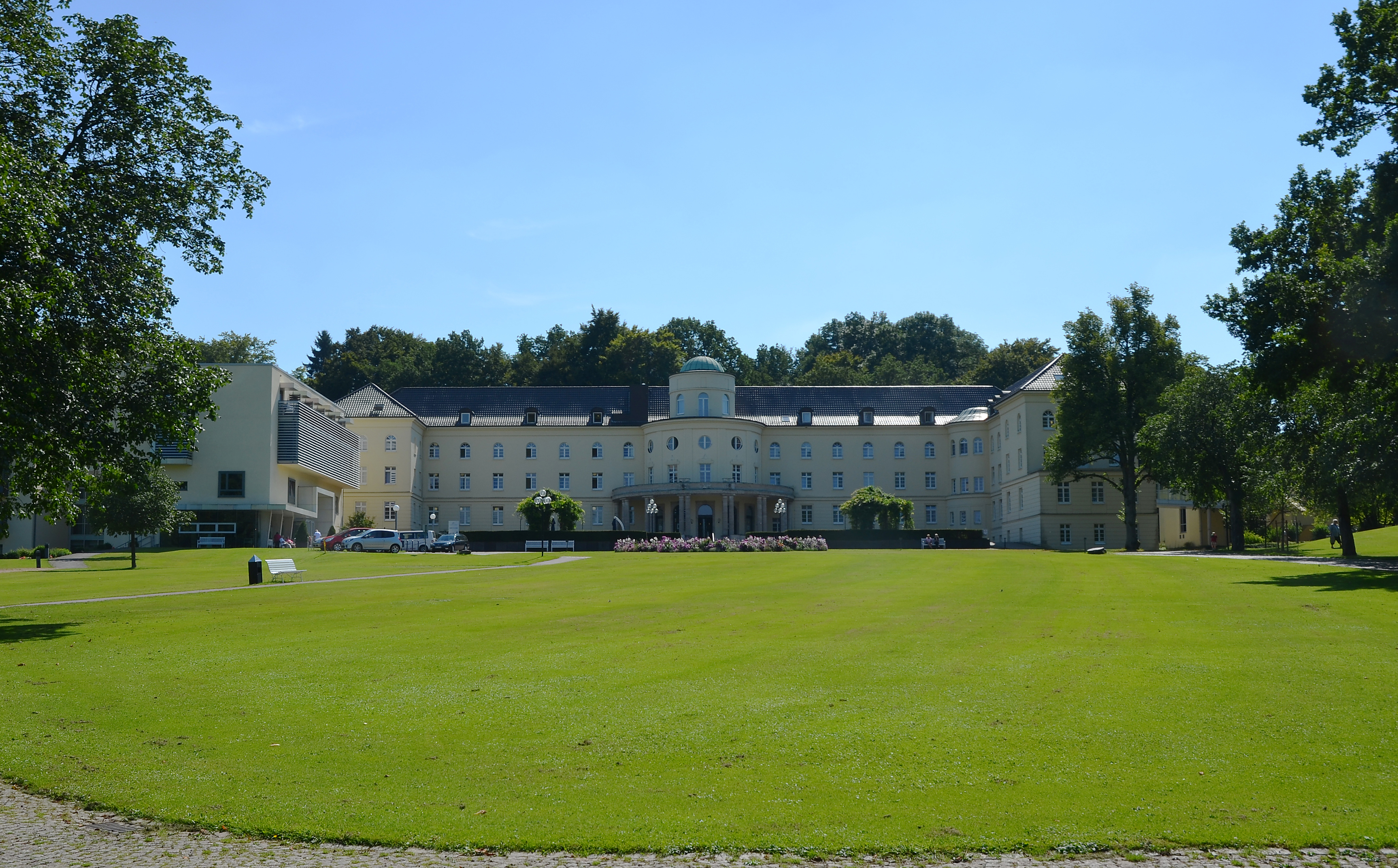 Park Klinik Bad Hermannsborn, Hermannsborn 1, Bad Driburg, Blick auf die denkmalgeschützte Fassade des historischen Kurhauses vom Park aus gesehen This image shows a heritage building in Germany, located in the North Rhine-Westphalian city Bad Driburg (no. 43).